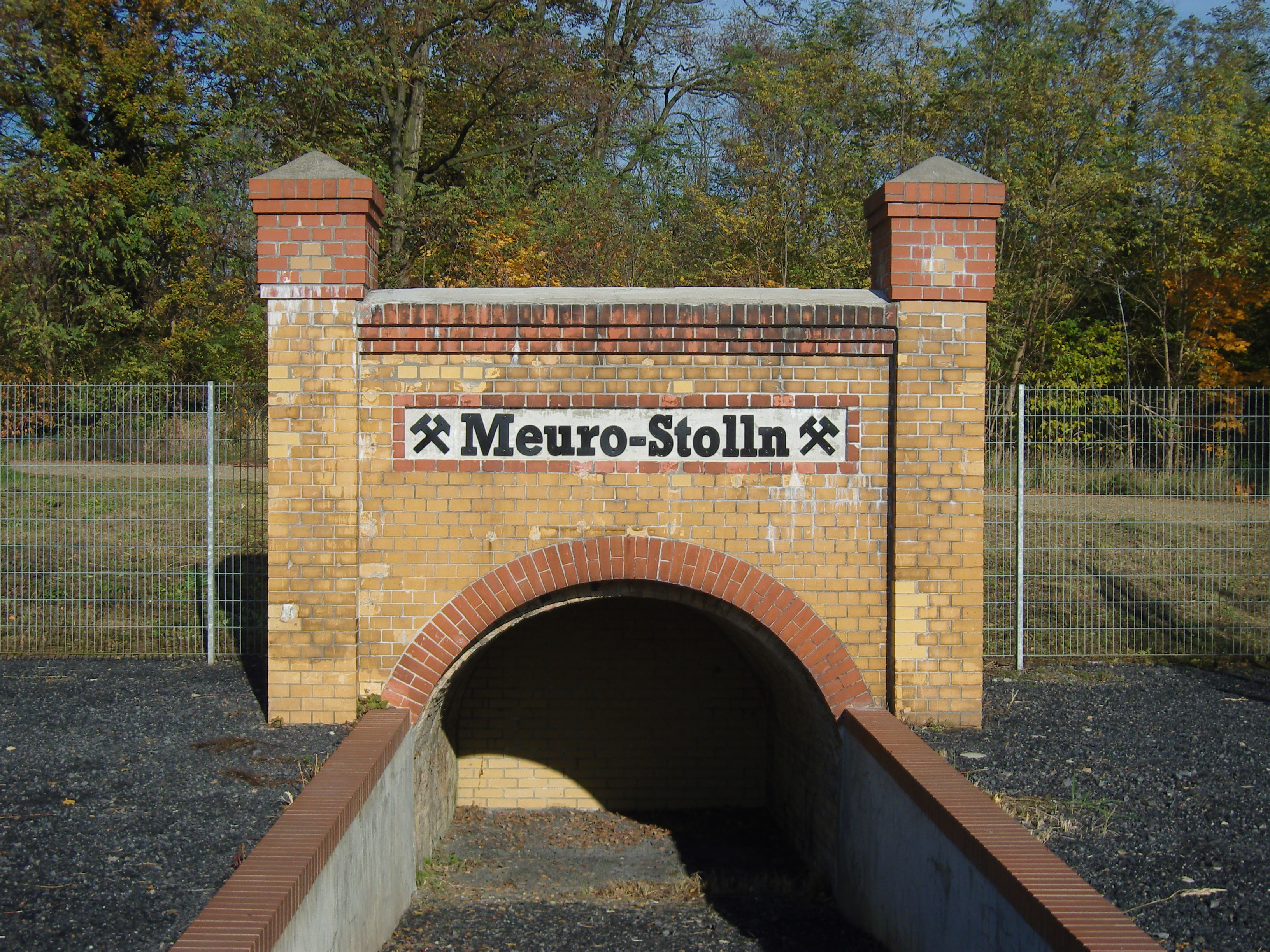 Eingang zum ehemaligen Braunkohleschacht Meurostolln in Hörlitz